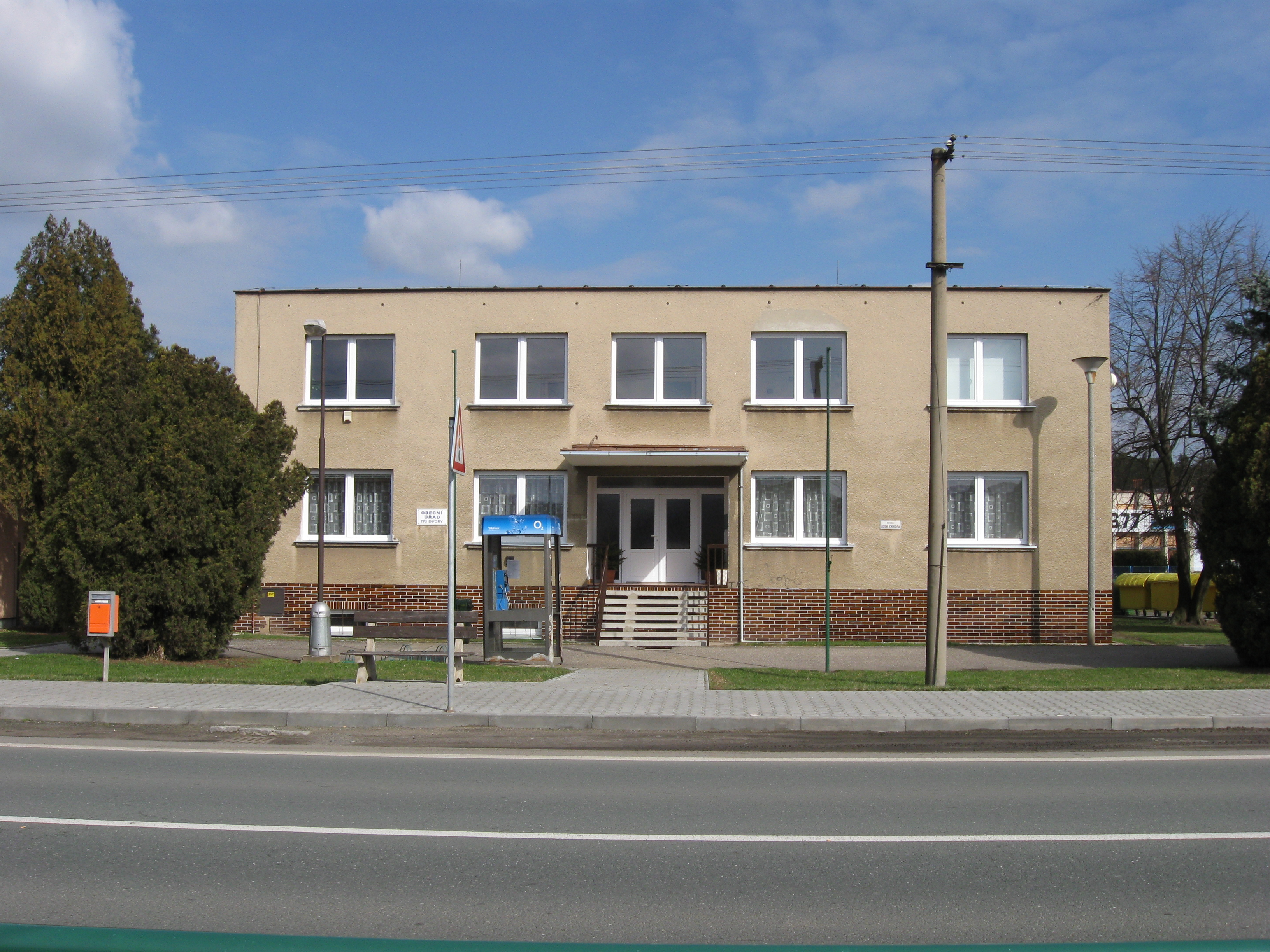 Česky: Tři Dvory, obecní úřad